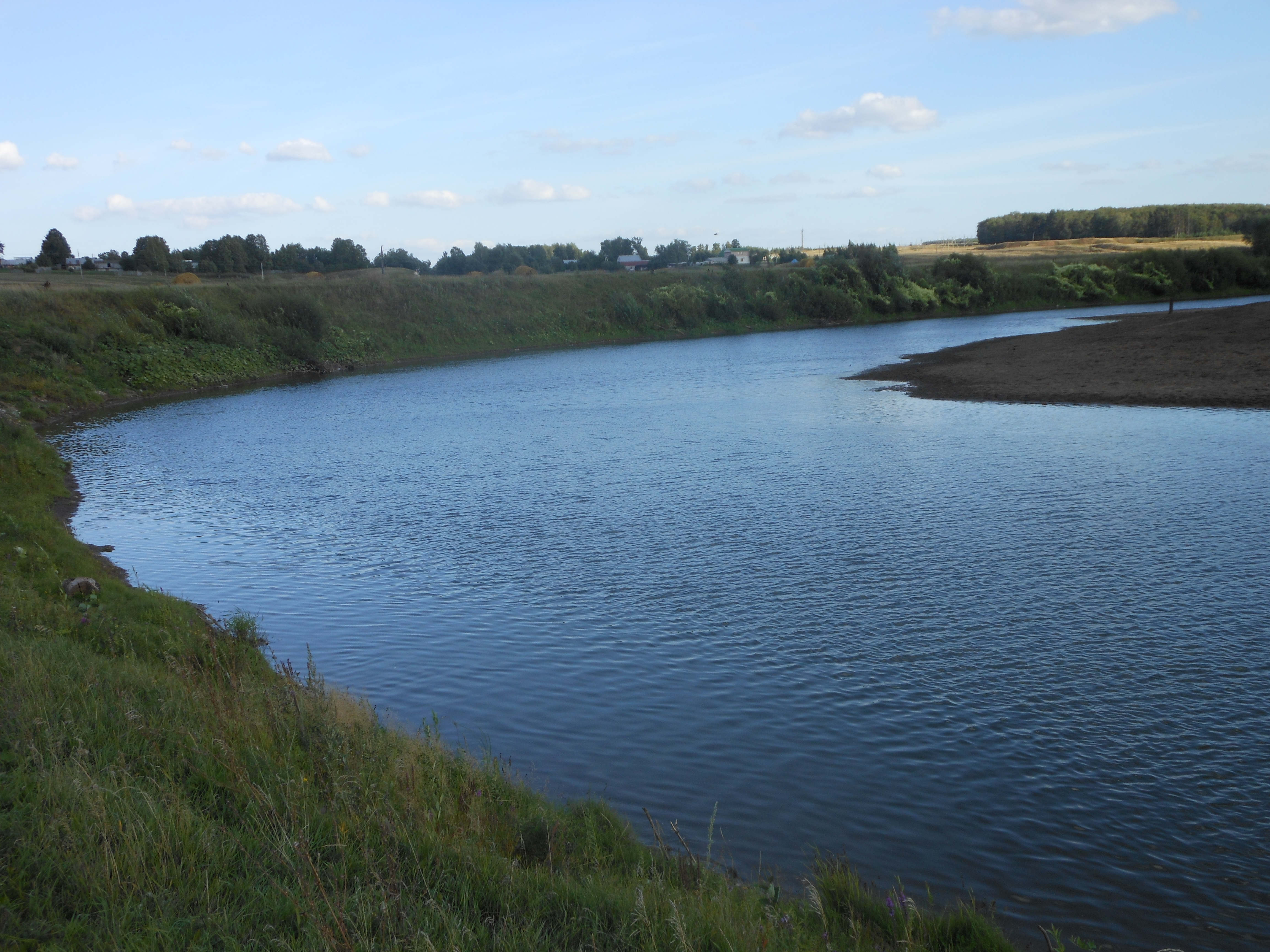 Вечер на Цивиле близ деревни Байгеево